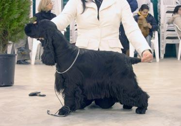 Pluricampione Francini's Varenne, cocker nero, prop.Kalesa